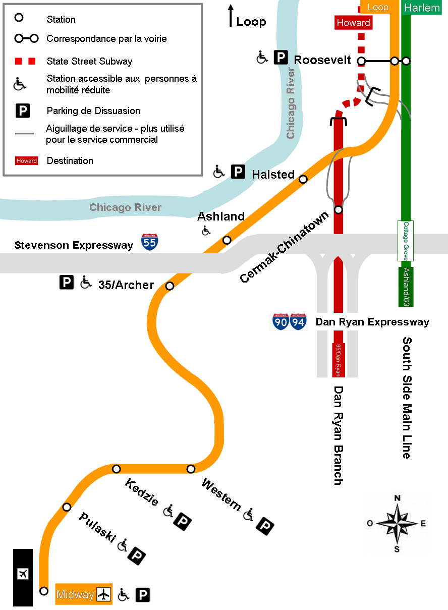 Plan de la Midway branch